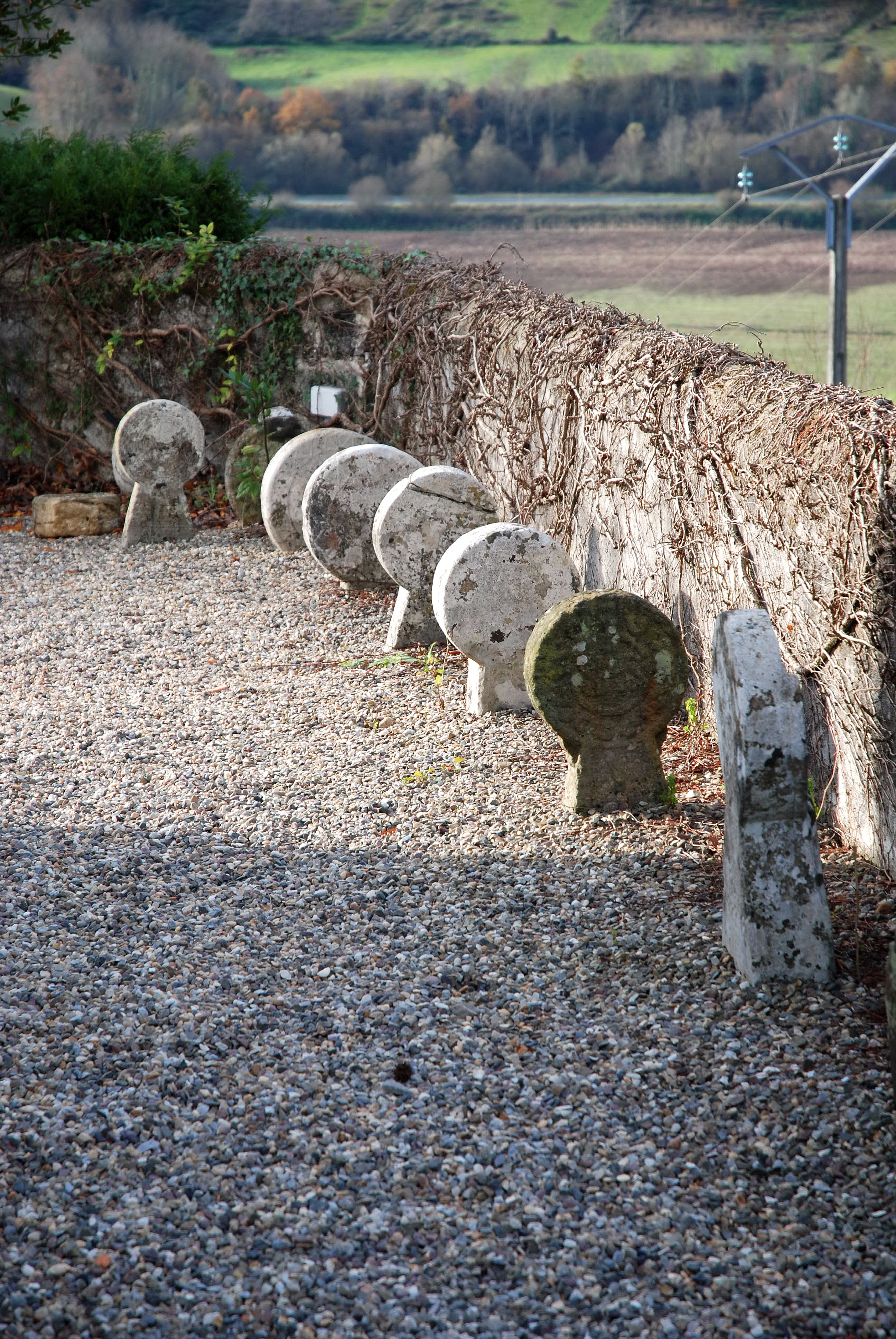 Jatxou, stèles discoïdales. Photo prise le 31/12/06 par Harrieta171